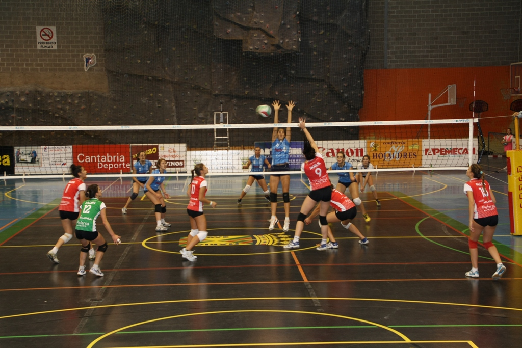 Partido de voliebol entre el Club Voleibol Torrelavega (primer plano) y el Club Voleibol Zalaeta en el Polideportivo La Habana Vieja de Torrelavega (Cantabria, España).